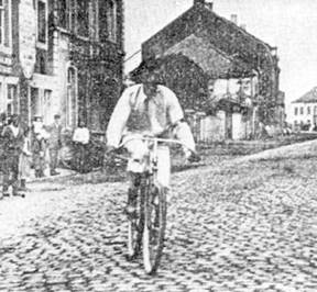 LÃ©on Houa